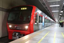 nueva unidad